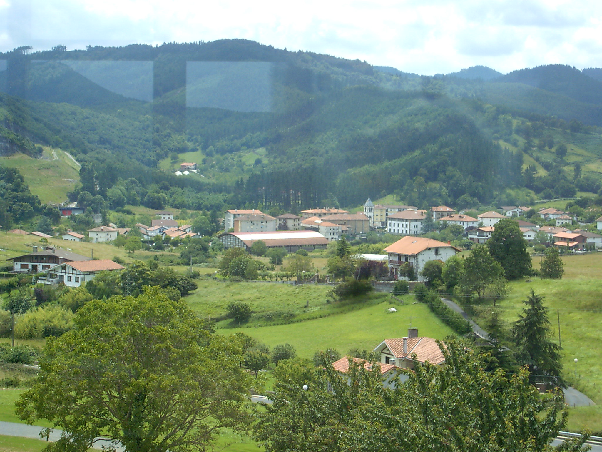 Altamira auzoa Madariaga dorretxetik